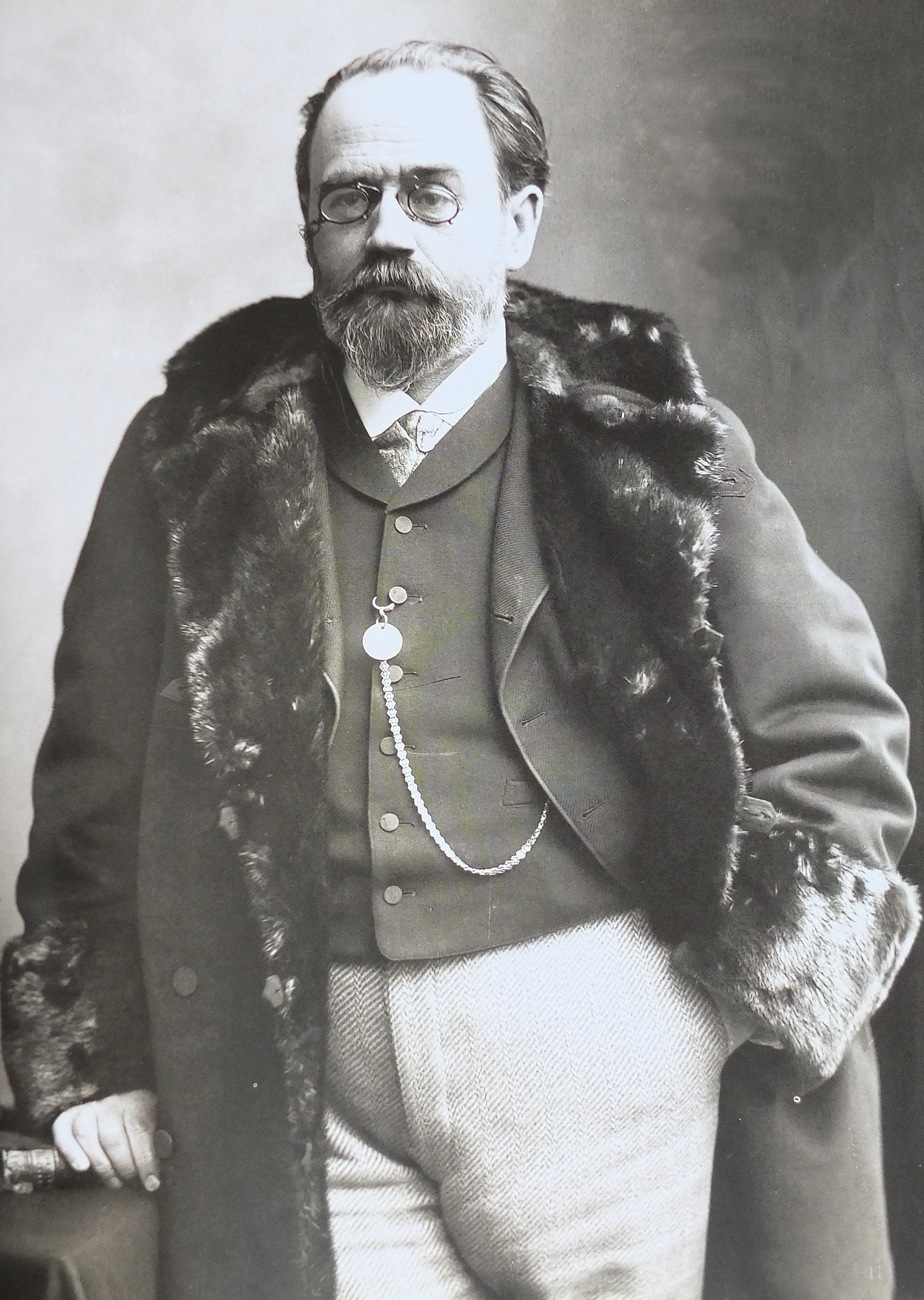 Émile Zola, photographié par Paul Nadar en 1895.